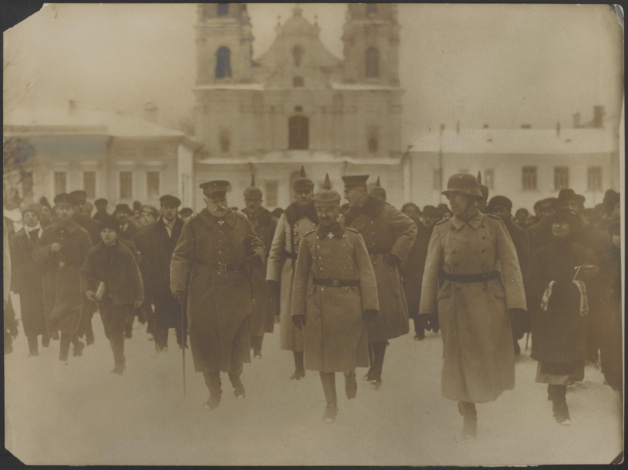 De Duitsche troepen bij den opmarsch in het bezette Minsk. Generaal-veldmaarschalk von Eichhorn (links) en generaal von Bredow (rechts) met officieren van den staf bezichtigen de pas ingenomen stad